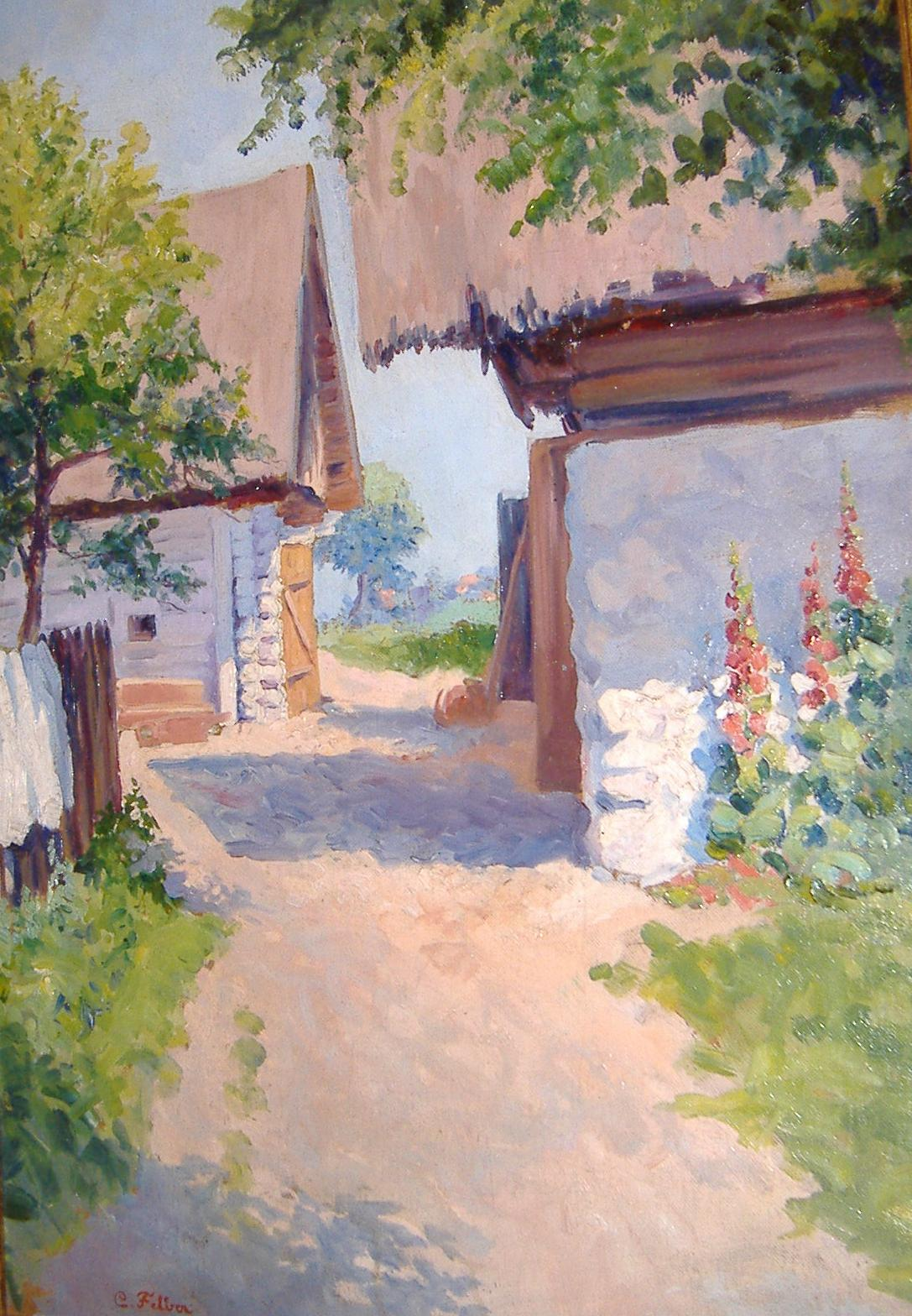 Dachau